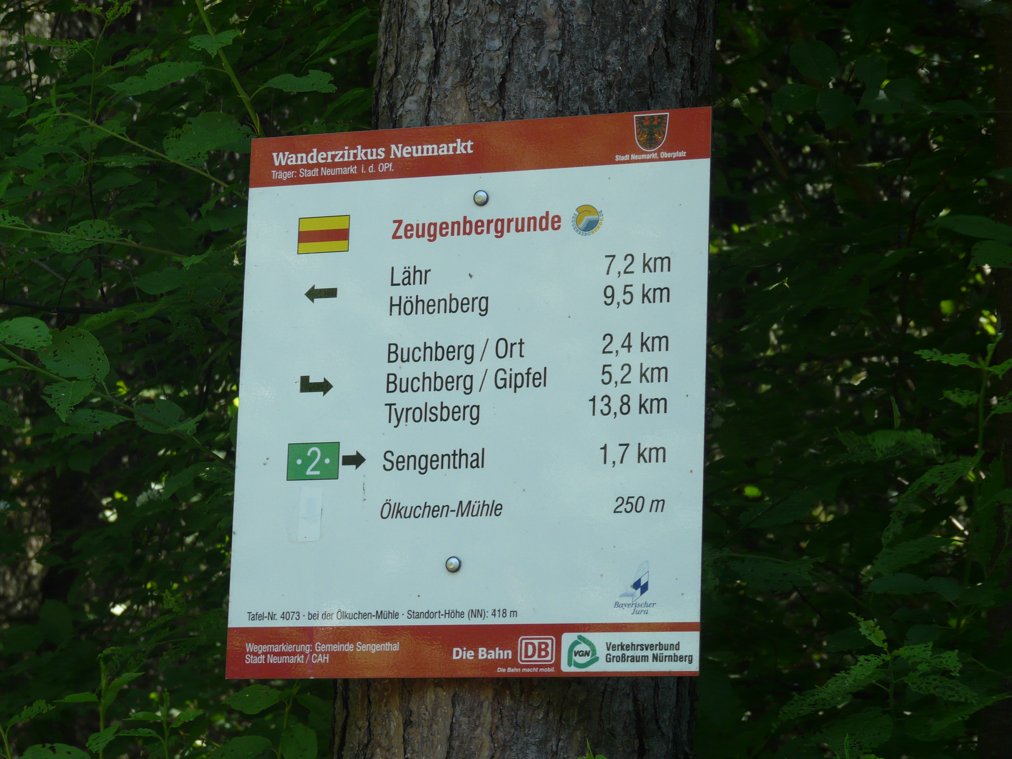 Zeugenbergrunde-Wandertafel am Ludwigskanal, nahe der Ölkuchenmühle in der Oberpfalz